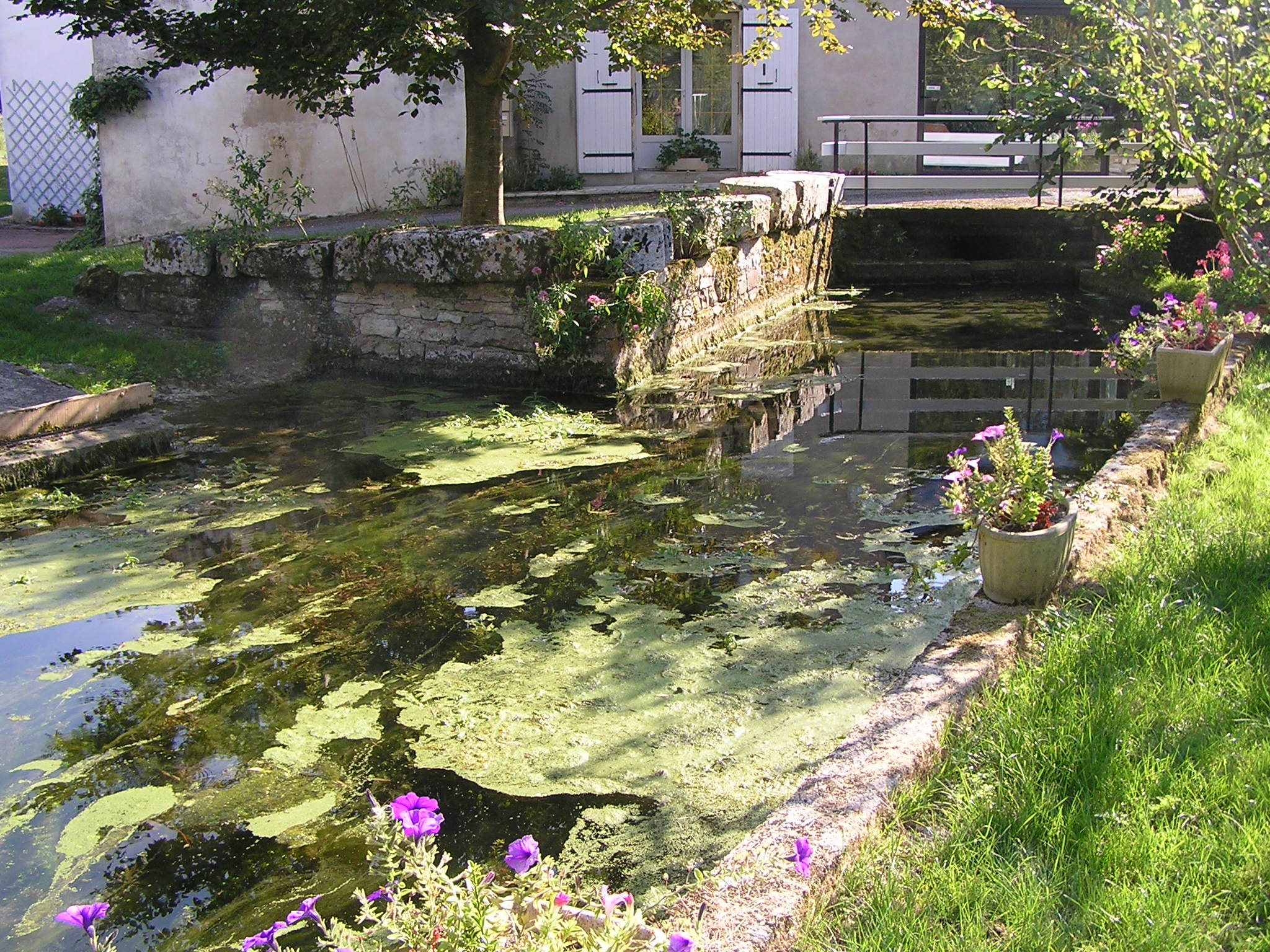 Moulin de Sonnac sur la Sonnoire en Charente-Maritime.